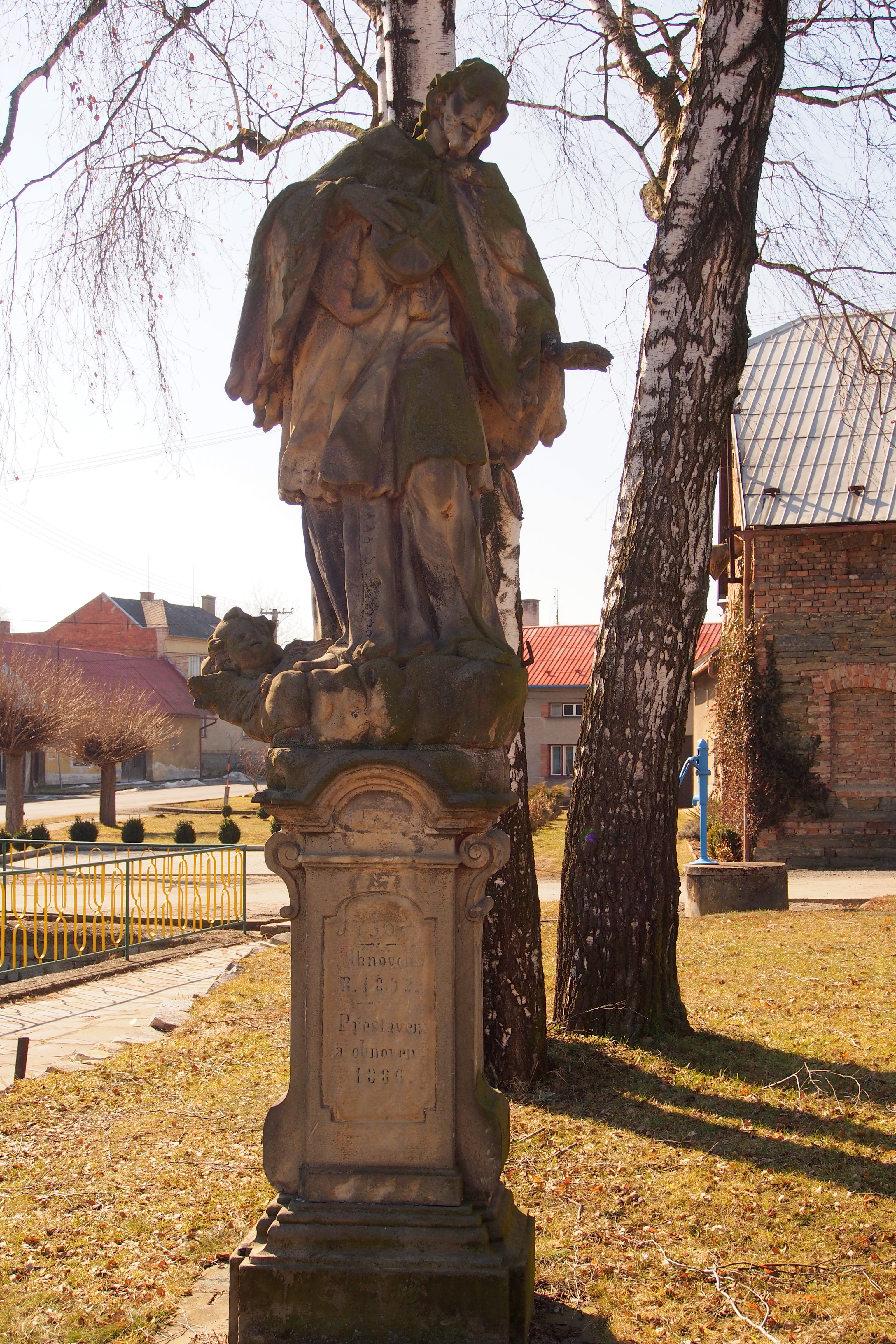 Socha svatého Jana Nepomuckého, náves, 1730, Jiří Antonín Heinz Lipňany (Tršice).